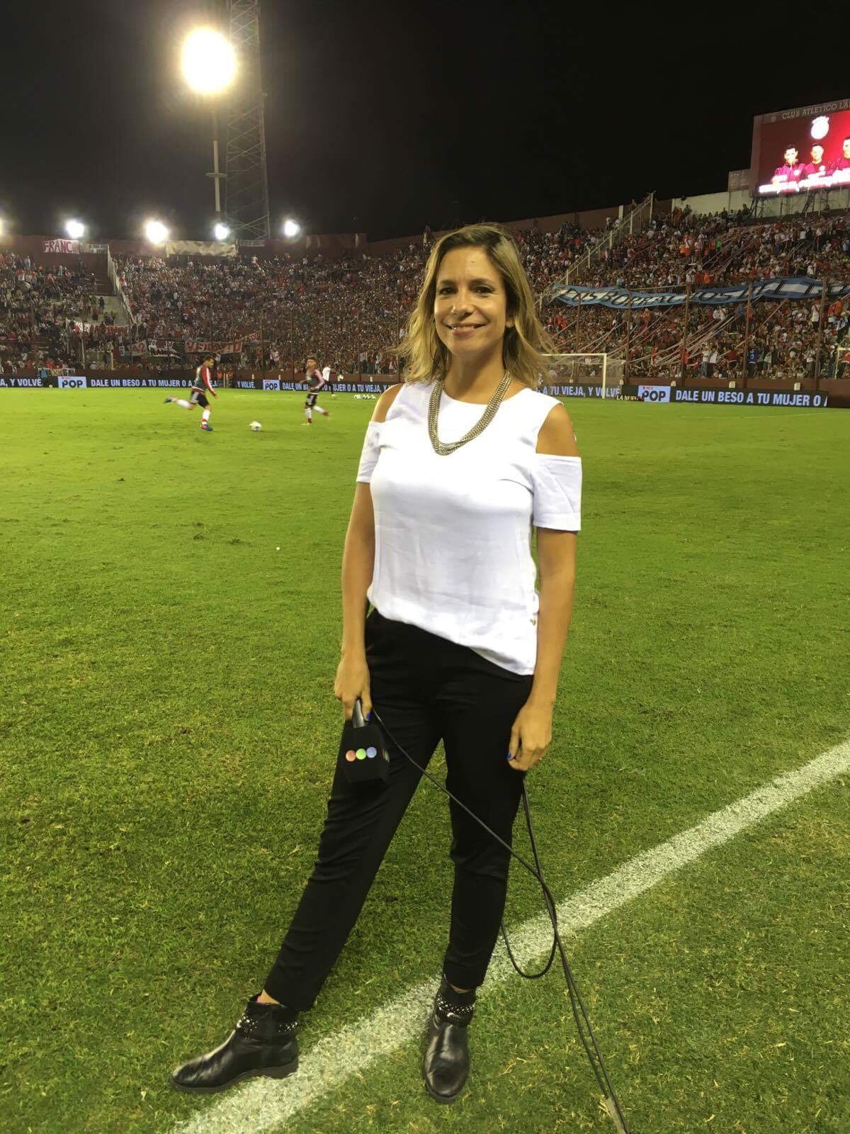 Alta resolución